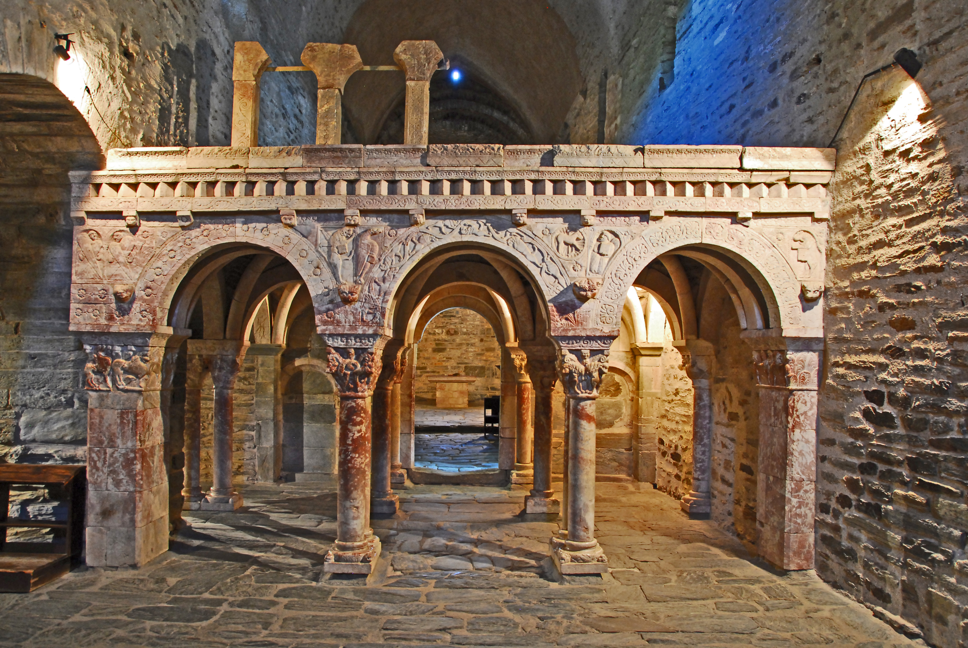 Serrabone, Empore, Westfassade